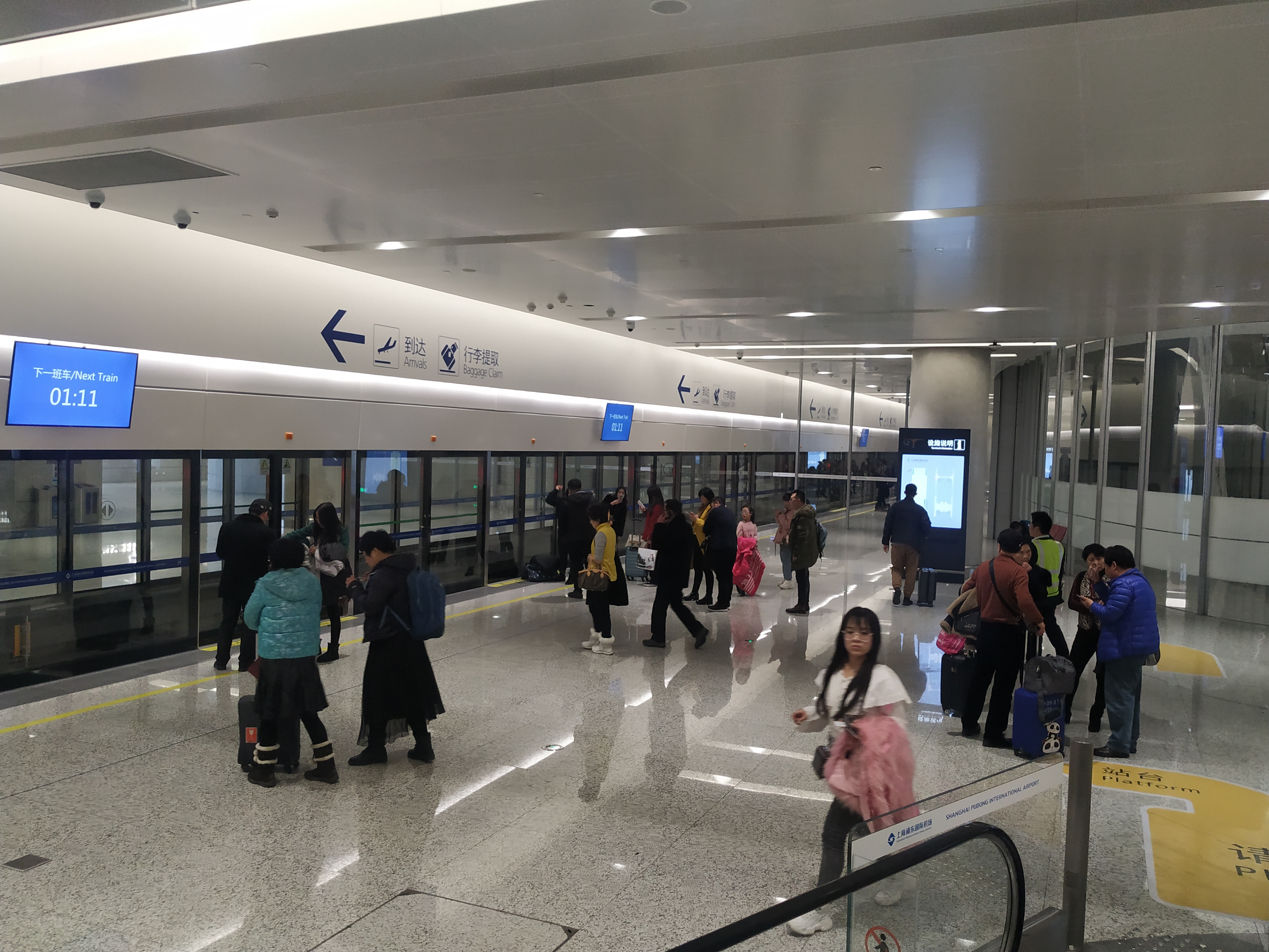 中文（中国大陆）: 上海浦东机场南卫星厅与T2间的捷运，采用西班牙式月台